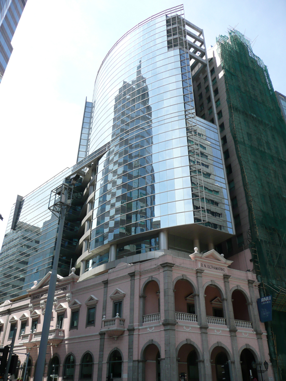 Banco Nacional Ultramarino building in Macau. 大西洋銀行, 高士德大馬路 78 至 80A 號 Avenida Horta e Costa, 澳門分行